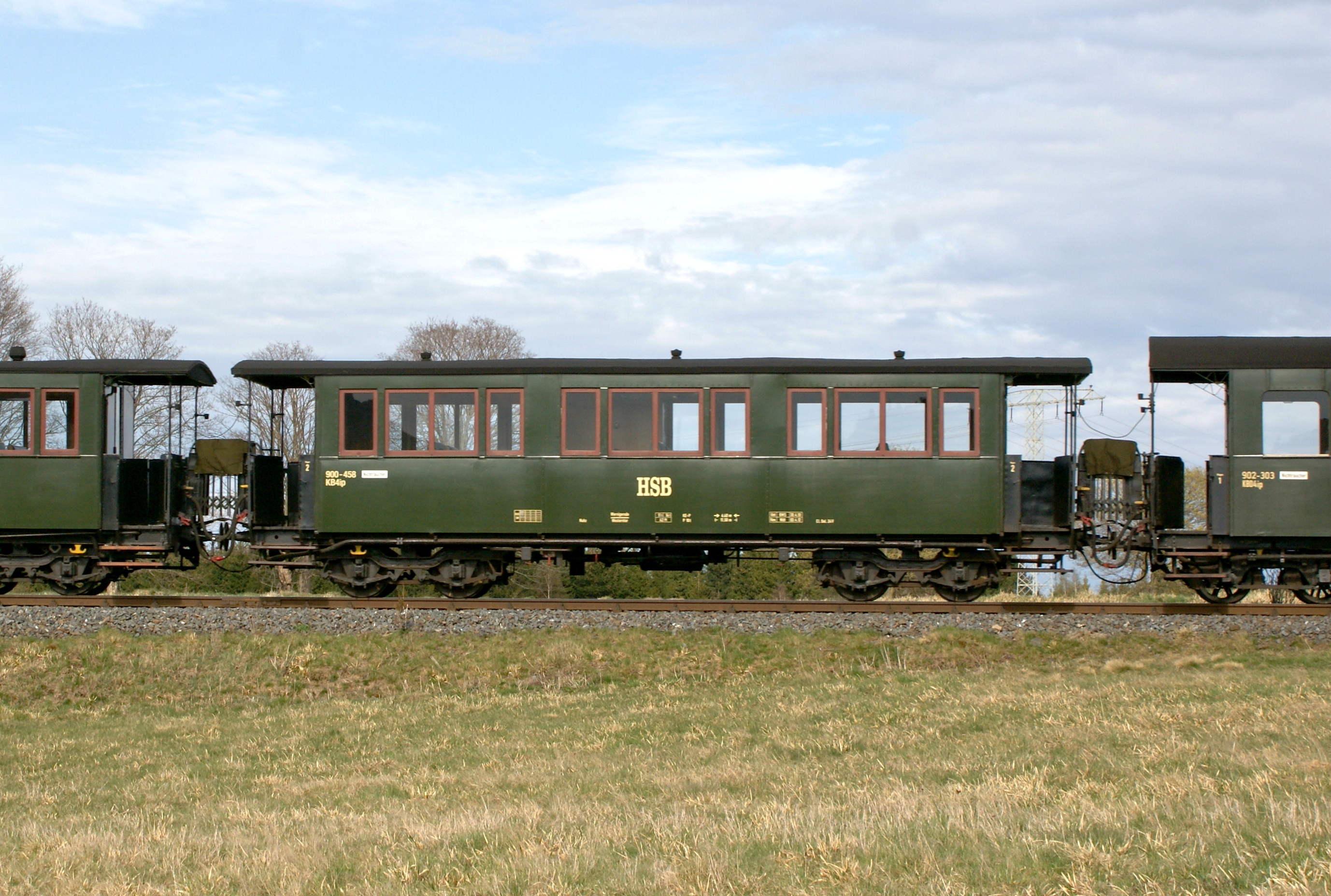 Reisezugwagen 900-458 der HSB (ex DR 900-458 ex 10164 ex SHE 10) Gattung KB4ip Hannover 1899 bei Benneckenstein am 27.April 2012